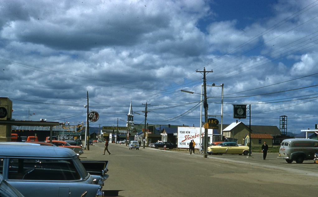 Diapositive couleur illustrant la rue Principale de la municipalité de Sept-Îles dans la région administrative de la Côte-Nord.